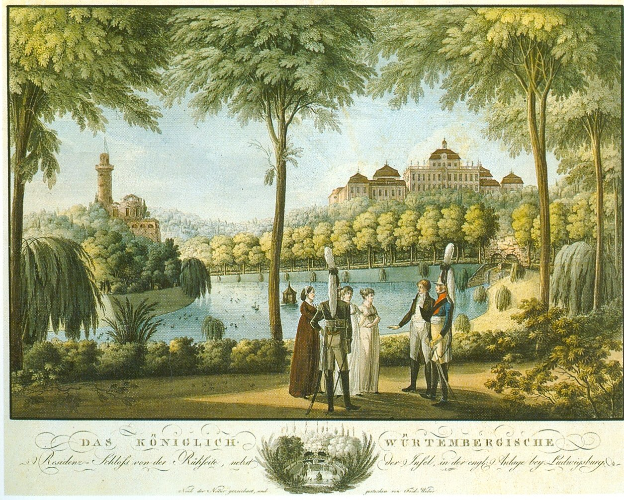 Schloss Ludwigsburg: Nordgarten mit altem Corps de Logis Kupferstich, koloriert Ludwigsburg, Städtisches Museum, Inv.Nr. 796